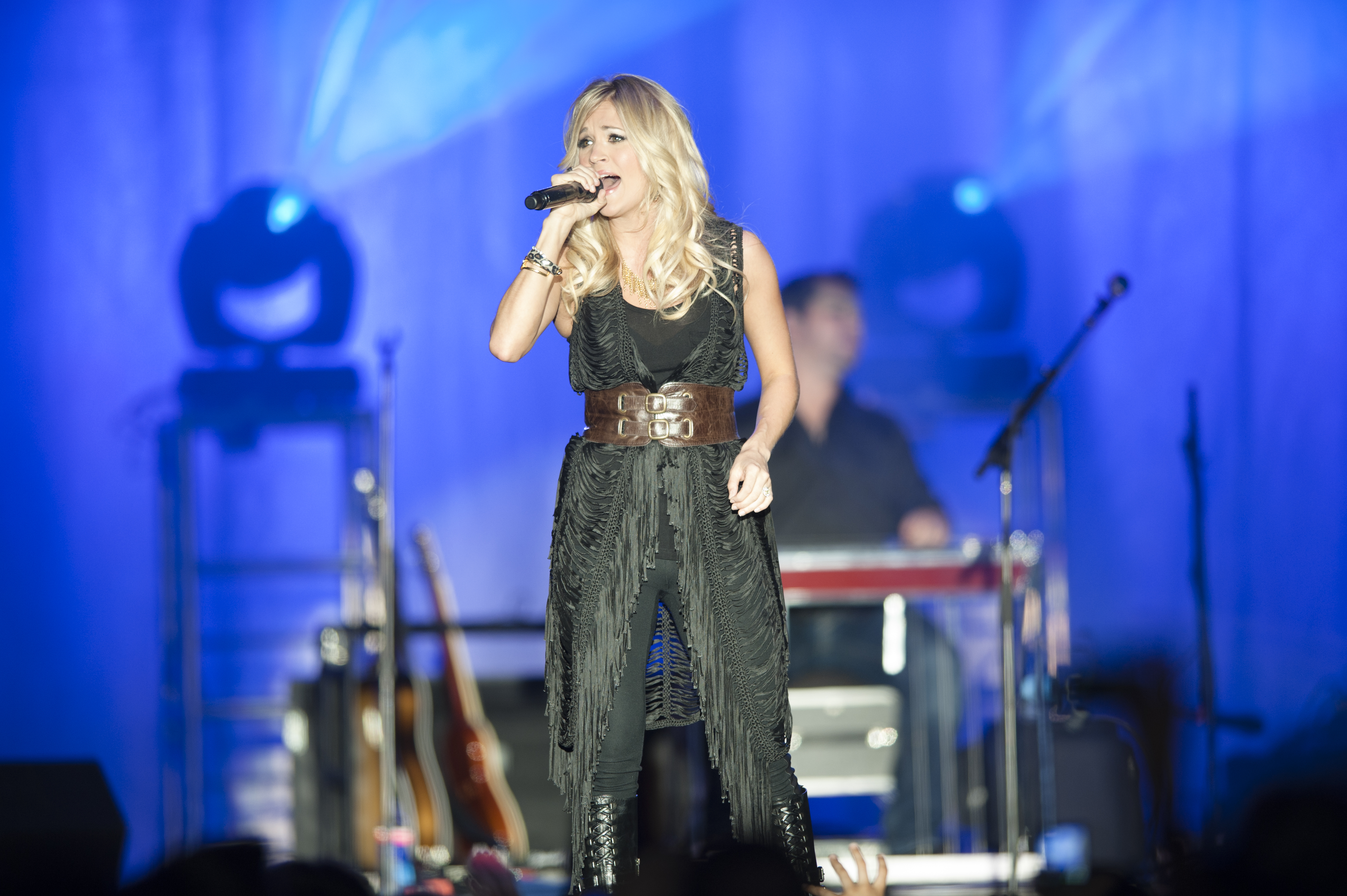 Carry Underwood_43